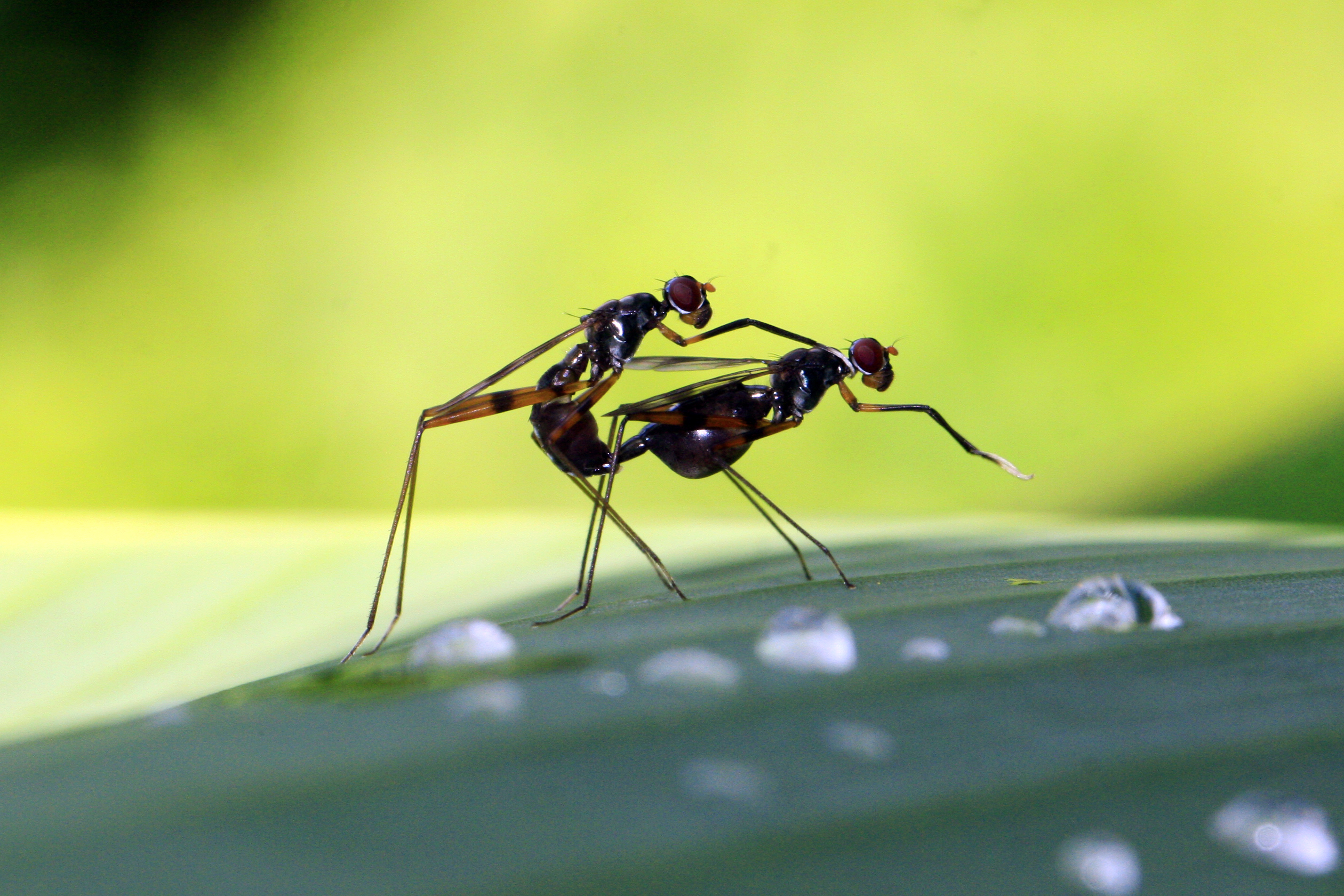 kehidupan serangga yang berada di belukar memiliki daya terik tersendiri. kegiatan mereka sering membuat kita terpesona. macrography adalah salah satu aliran foto yang menyajikan object mini yang dapat dilihat dengan mudah